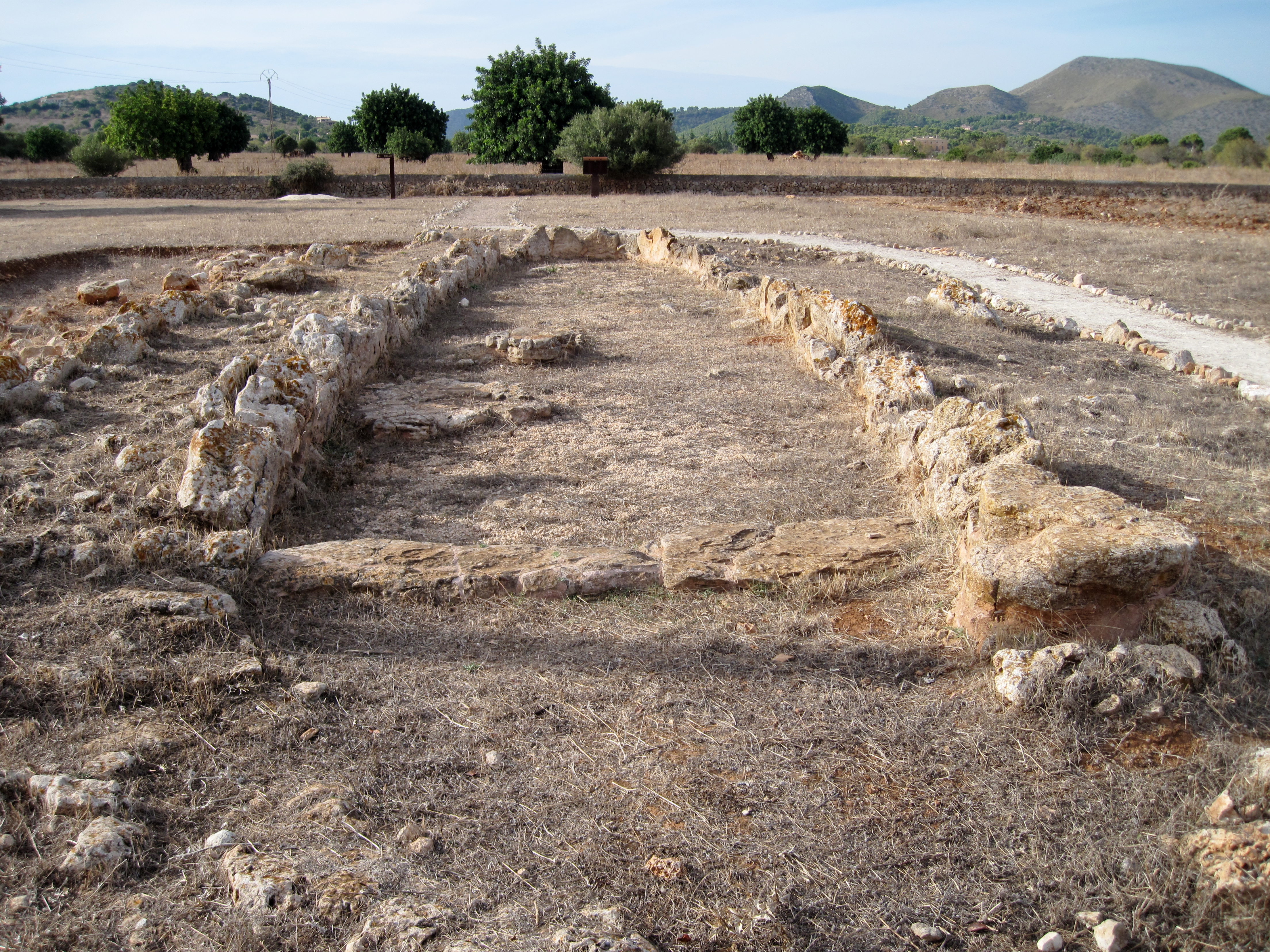 Naviforme Gebäuderreste im talaiotischen Dorf von S’Hospitalet Vell, einer Ausgrabungsstätte in der Gemeinde Manacor, Mallorca, Spanien